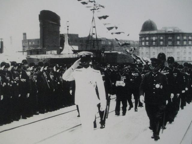 1940年、2回目の日本公式訪問をした溥儀。